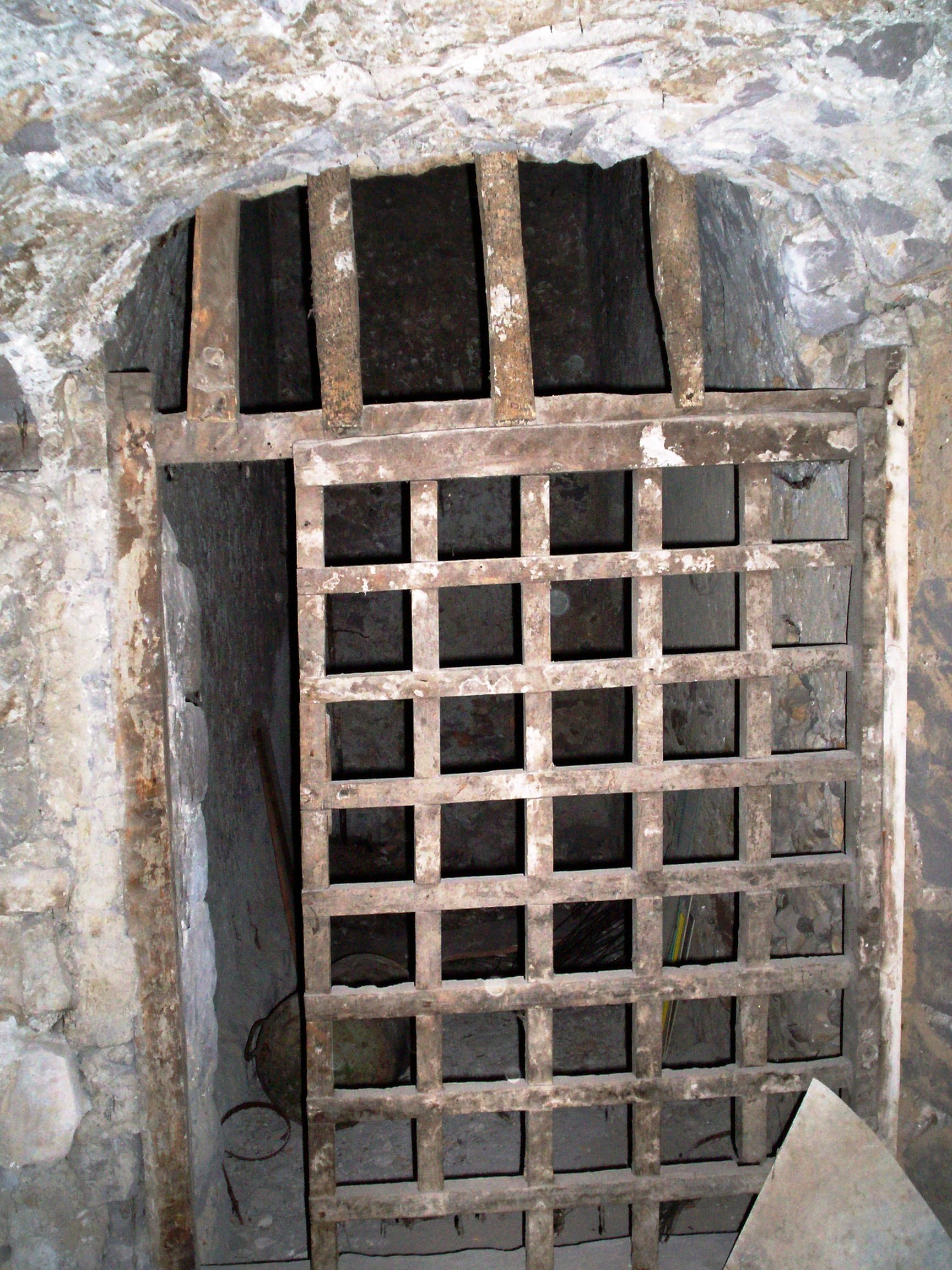 particolare dell'accesso ad una cella delle "carceri" site nell'Ex Monastero delle Clarisse in Cerreto Sannita (Bn); si ringraziano le Suore del Buono e Perpetuo Soccorso di Cerreto Sannita (Bn) che hanno permesso di poter fotografare questo ambiente.